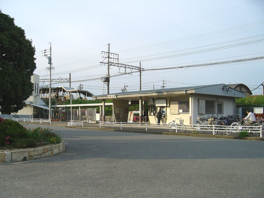 近鉄・新正駅